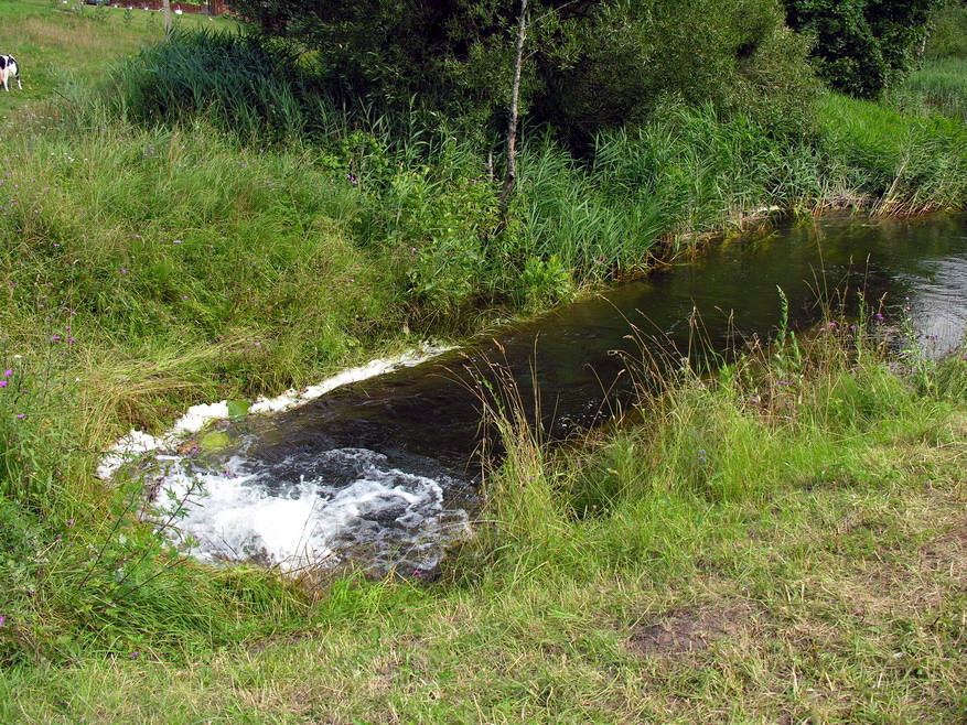 Žemaitėška: Babrungs (lt. Babrungas), opės ištakas. Žemaitėjės naciuonalėnis parks